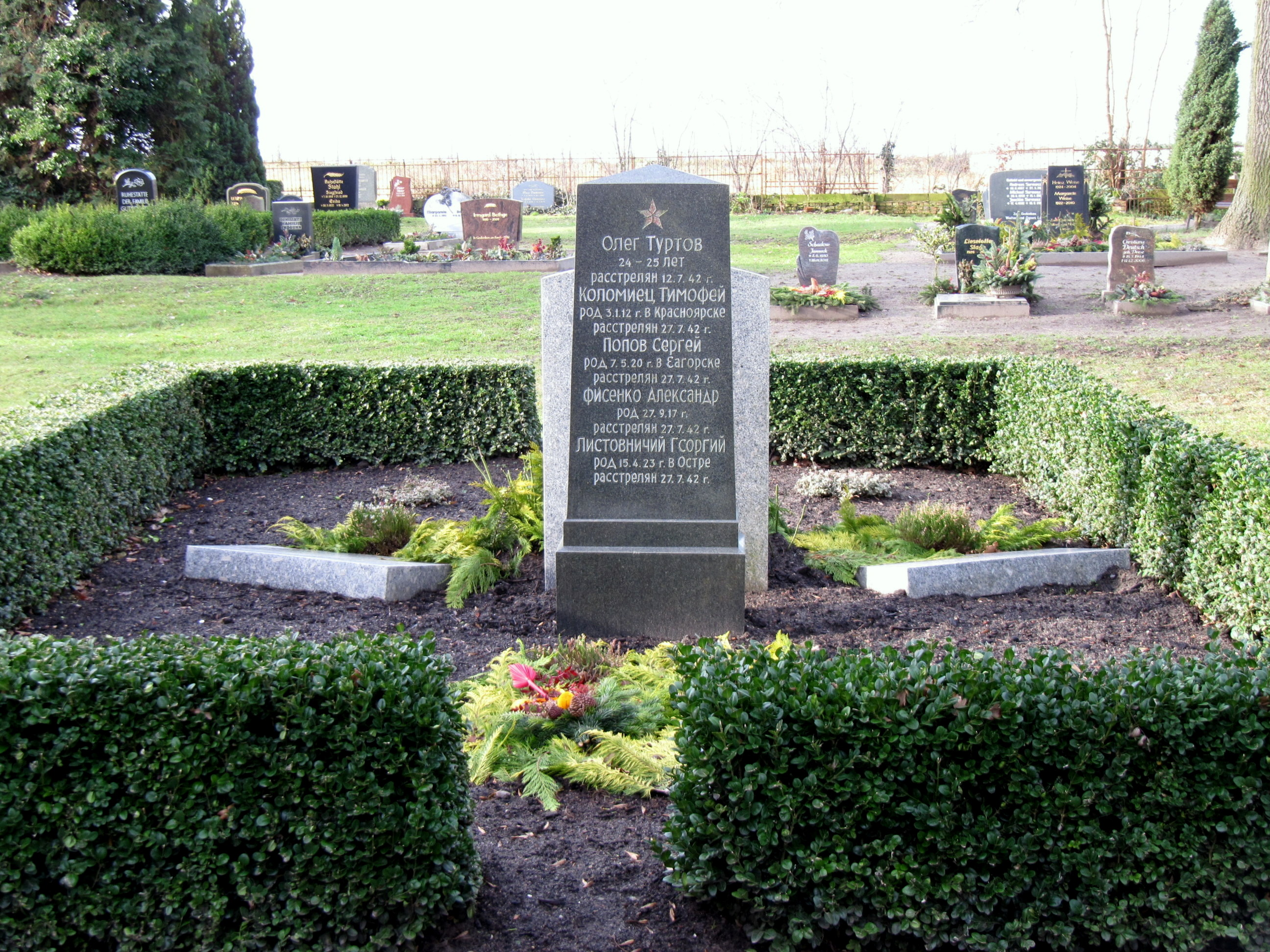 mahnmal butzow